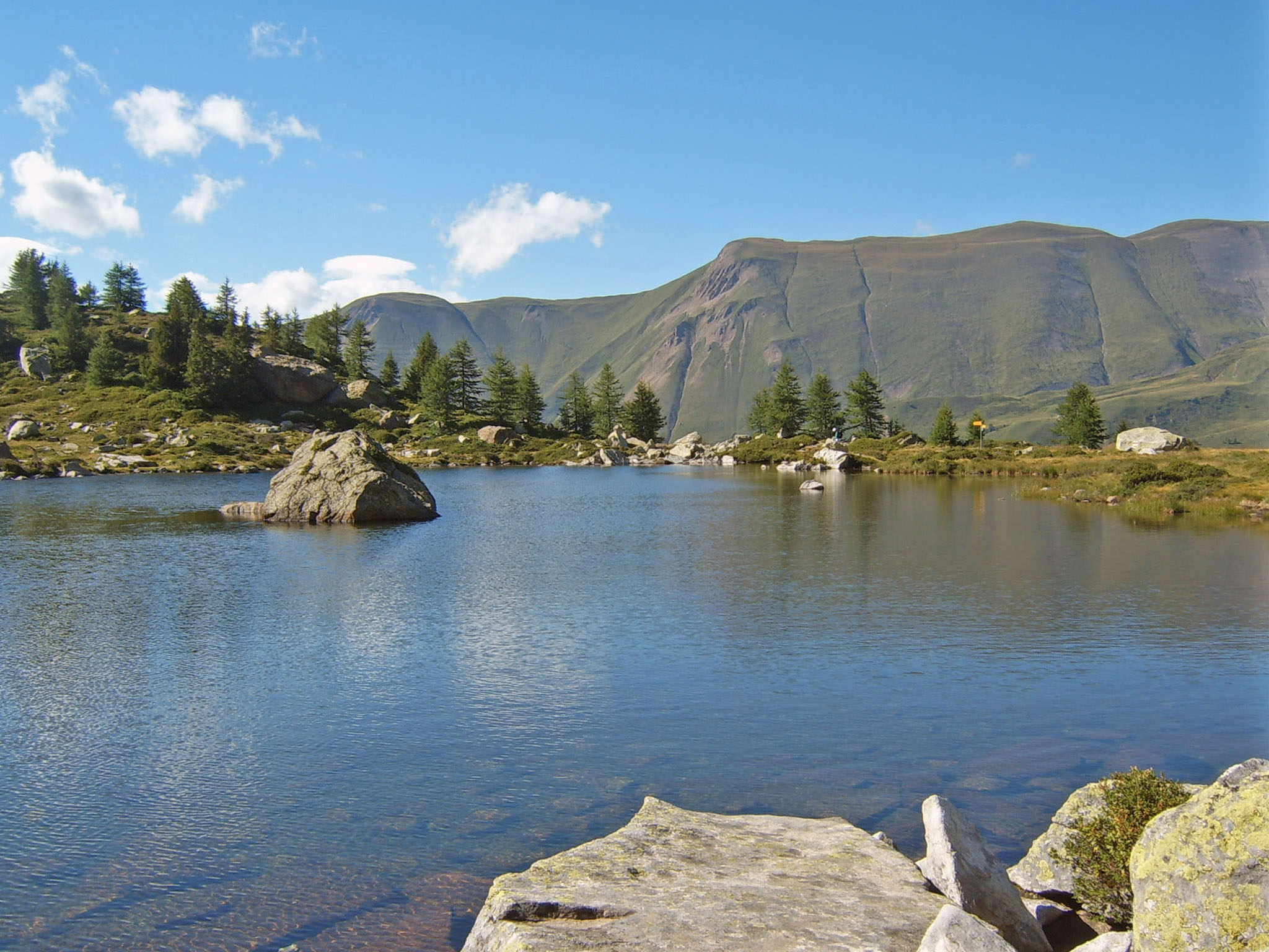 Landschaftspark Binntal